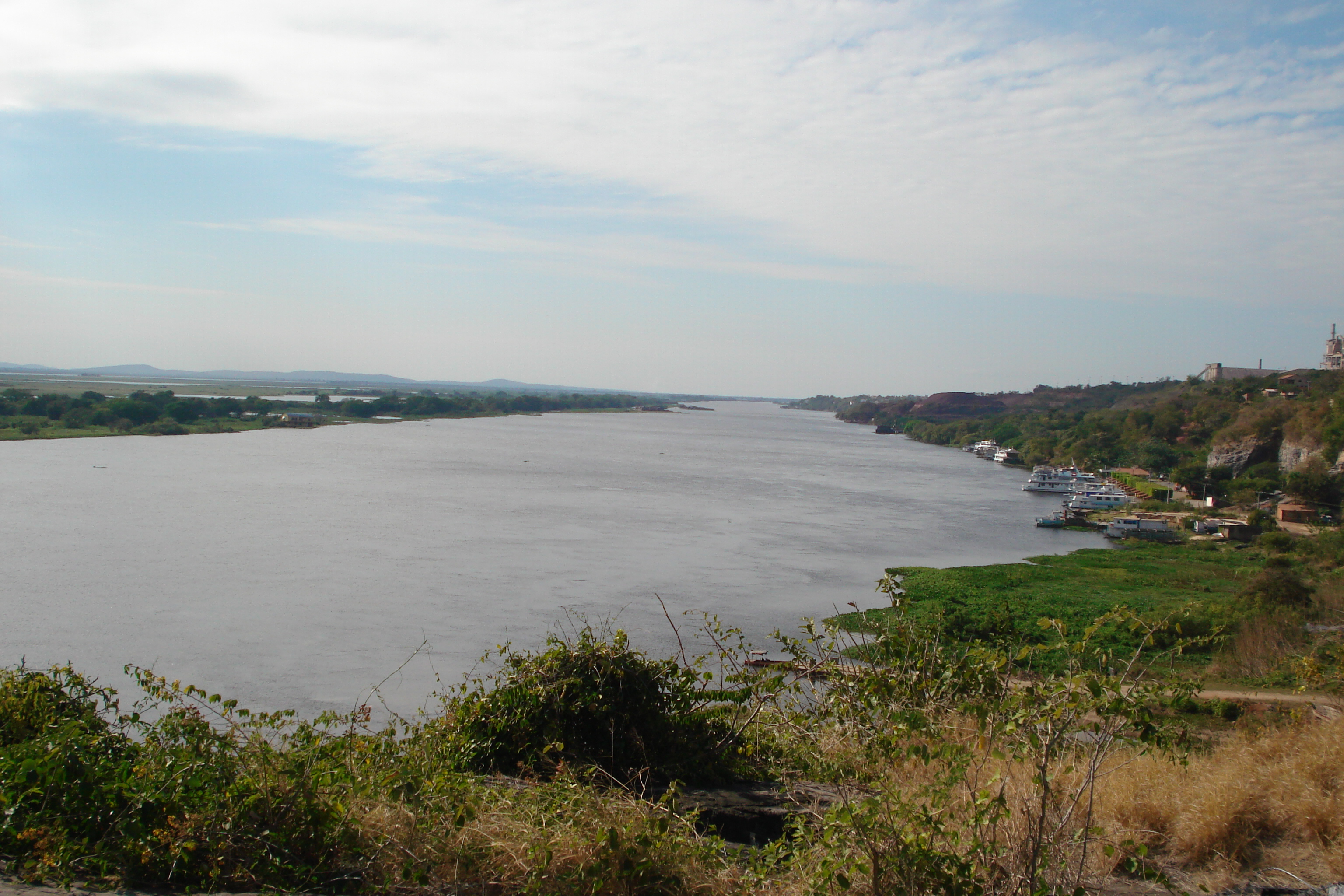 Vista do rio Paraguai na altura de Corumbá